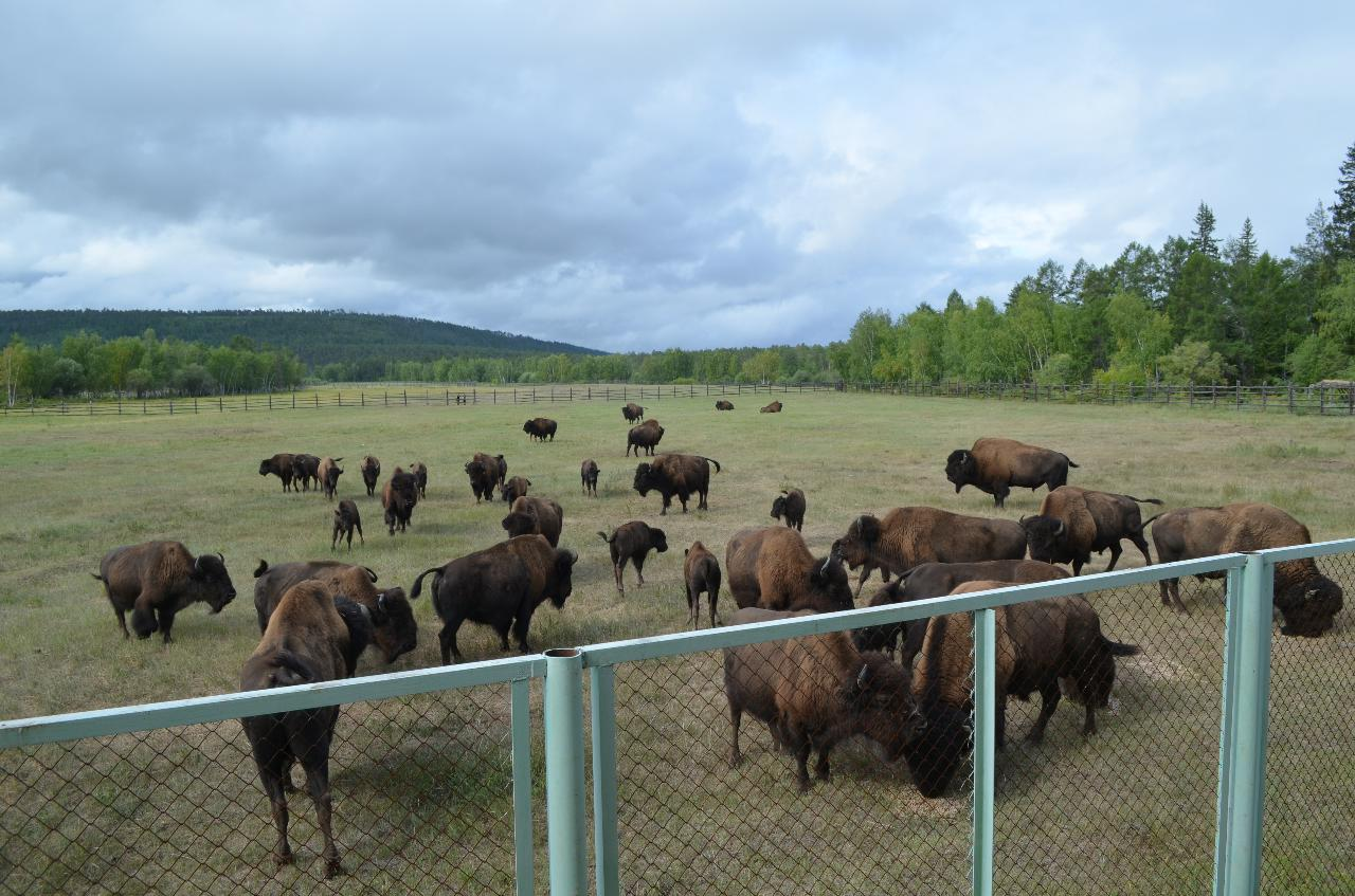 В Усть-Буотамском заповеднике, Хангаласский район, Якутия